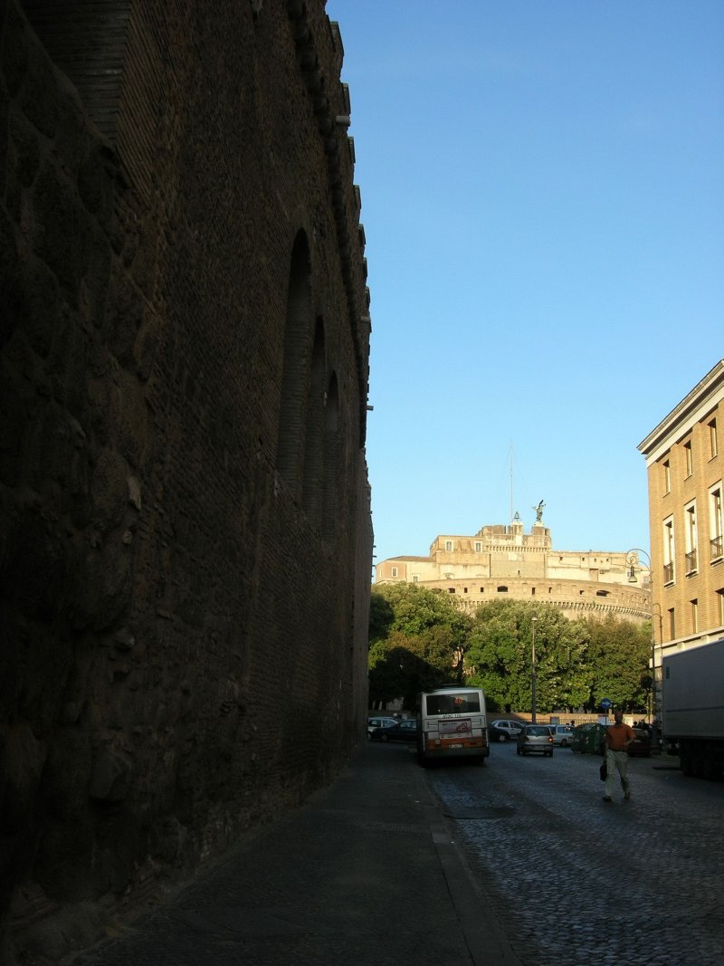 Il Passetto di Borgo with Castel Sant'Angelo (Rome).